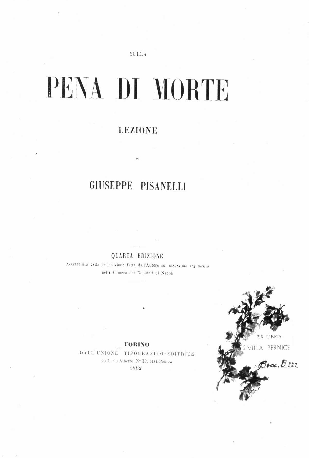 Frontespizio